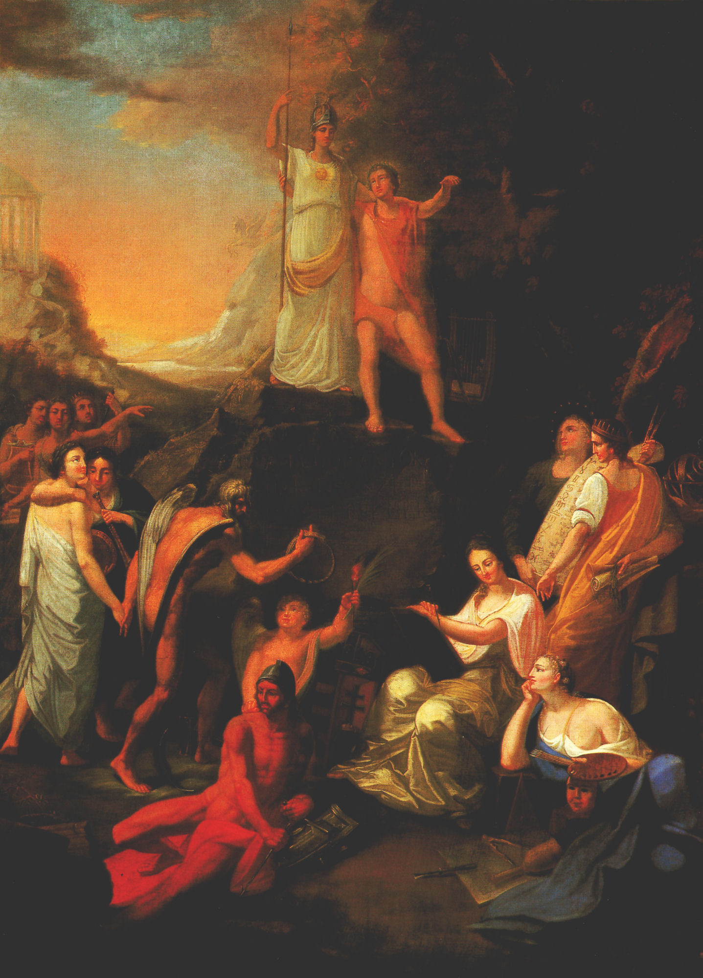 Balkay Pál: Allegória „A Tudomány és Szép Mesterségek Emlékezetére”, A béke áldásai